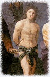 St. Sebastian